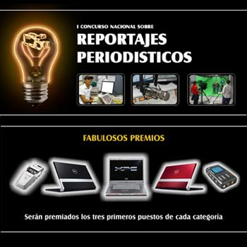 Concurso nacional enciende tus ideas